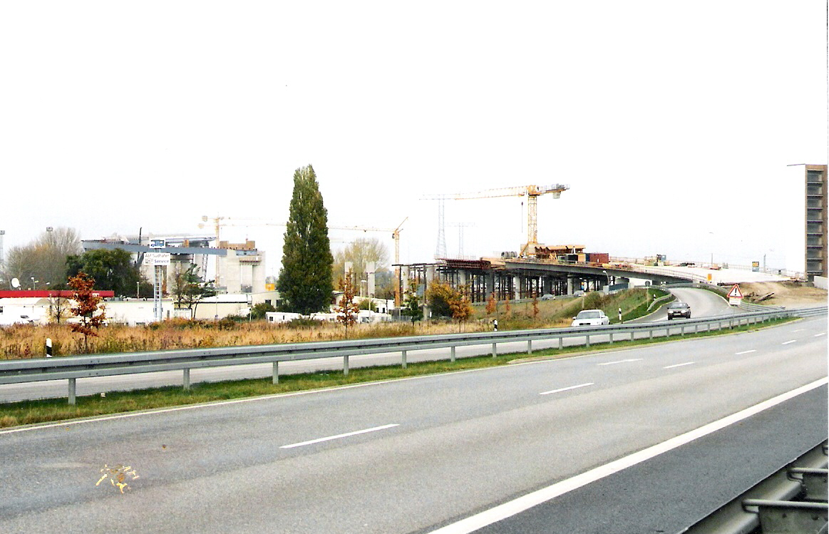 Autor: Benutzer:Klugschnacker Stralsund, Neue Strelasundquerung, Verlauf auf Stralsunder Seite, Vorlandbrücken (2005-11-05)